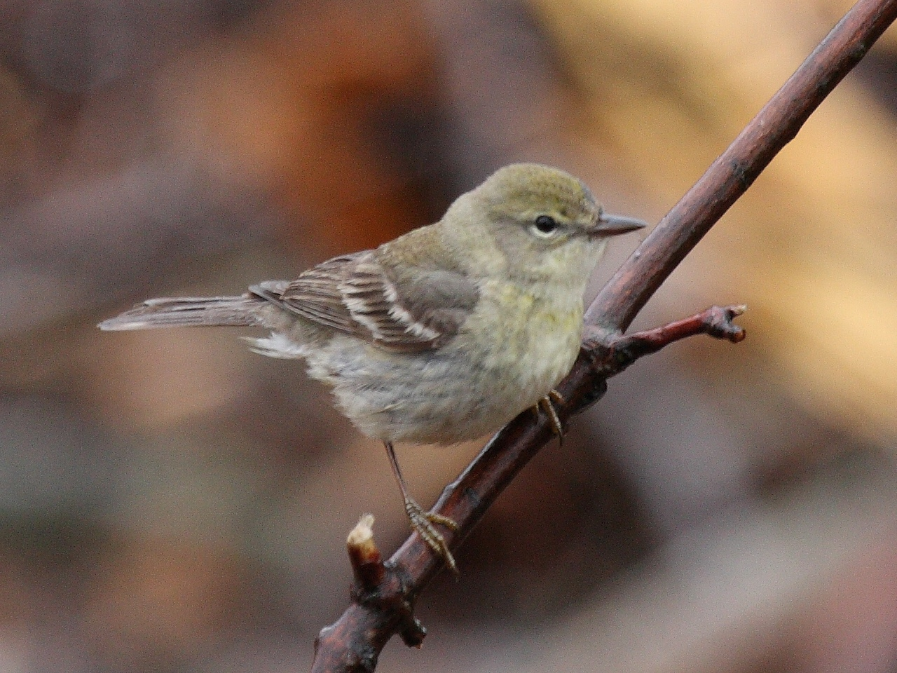 Female Pine Warbler (Dendroica pinus), Michigan USA